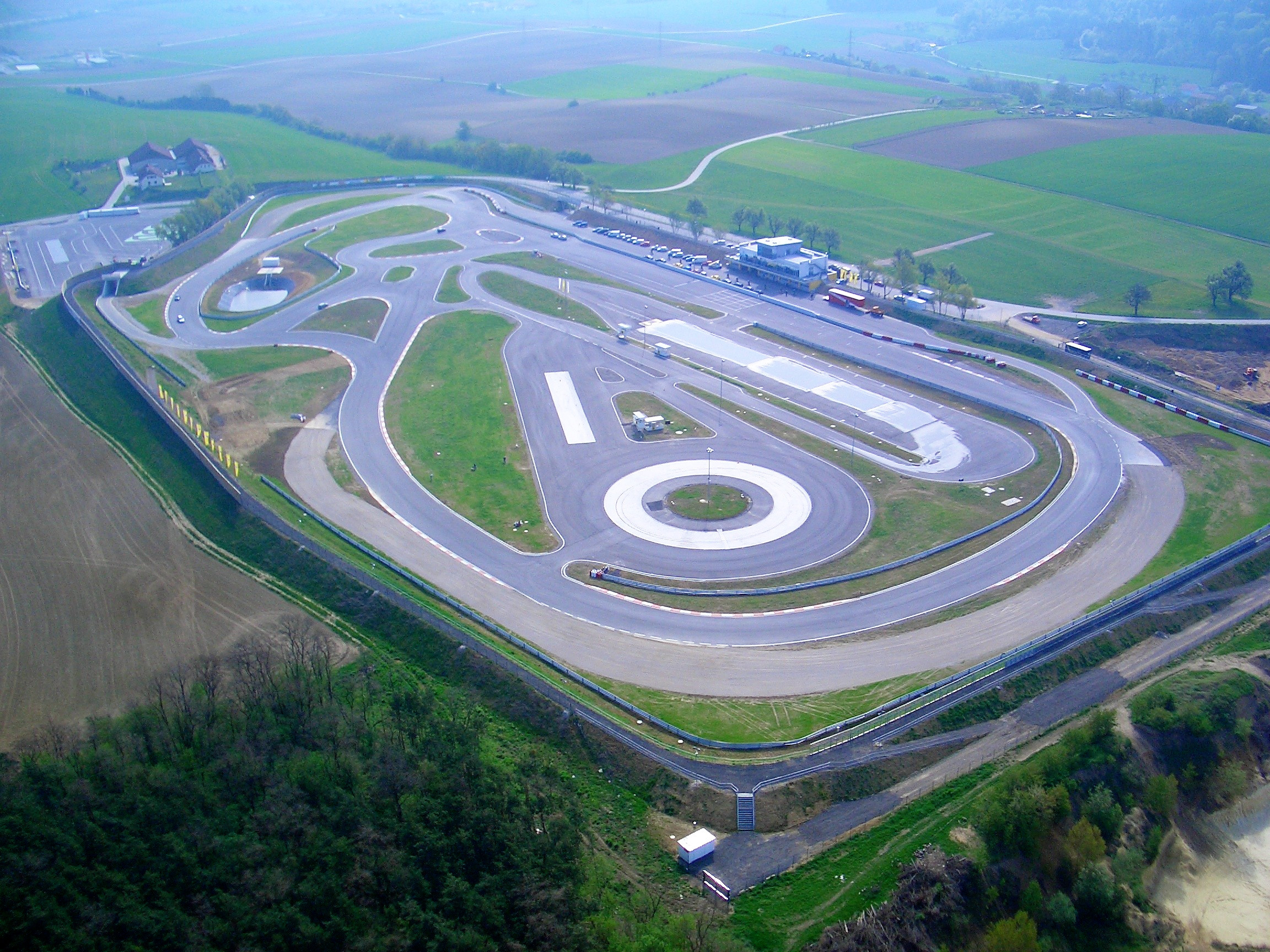 Luftaufnahme Wachauring West